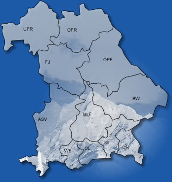 Die Regionen des Bayerischen Skiverbands e.V.